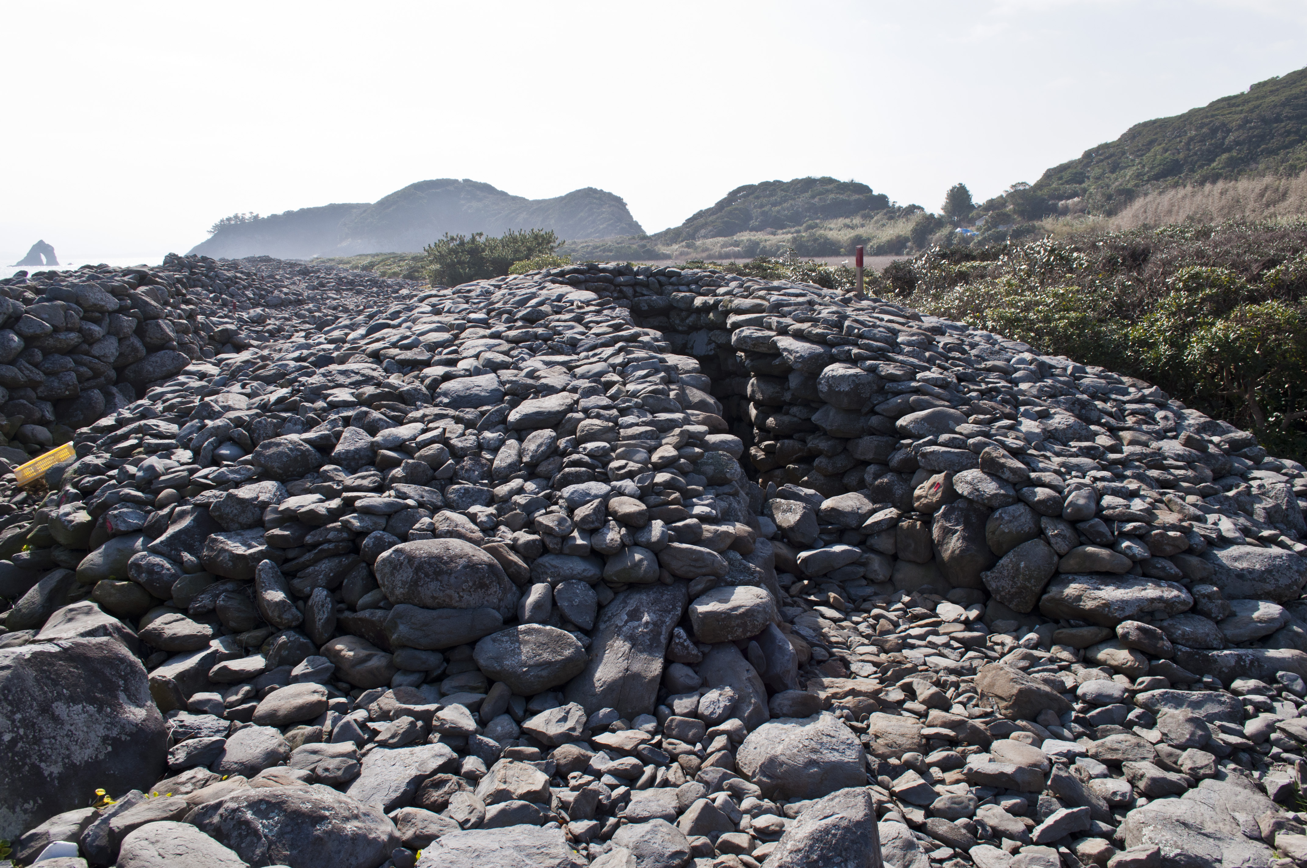 新宮町相島の古墳。6世紀頃に建造された。